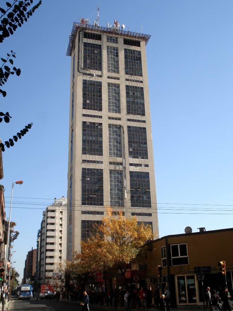 Torre Angela, Córdoba, Argentina